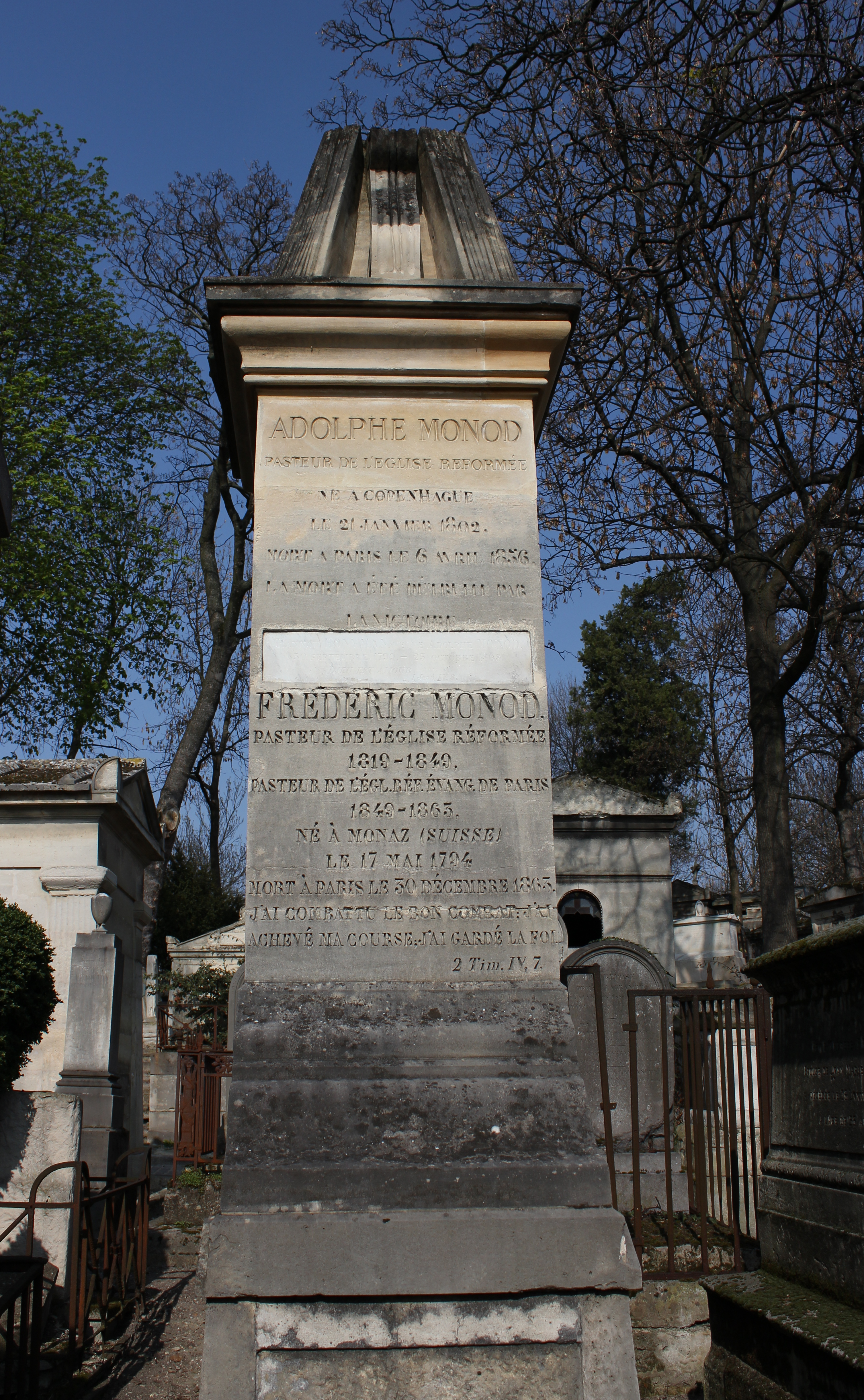 Sépulture de la famille Monod, famille de pasteurs, dont Adolphe Monod (1802-1856). Sépulture surmontée d'une Bible.vue d'ensemble